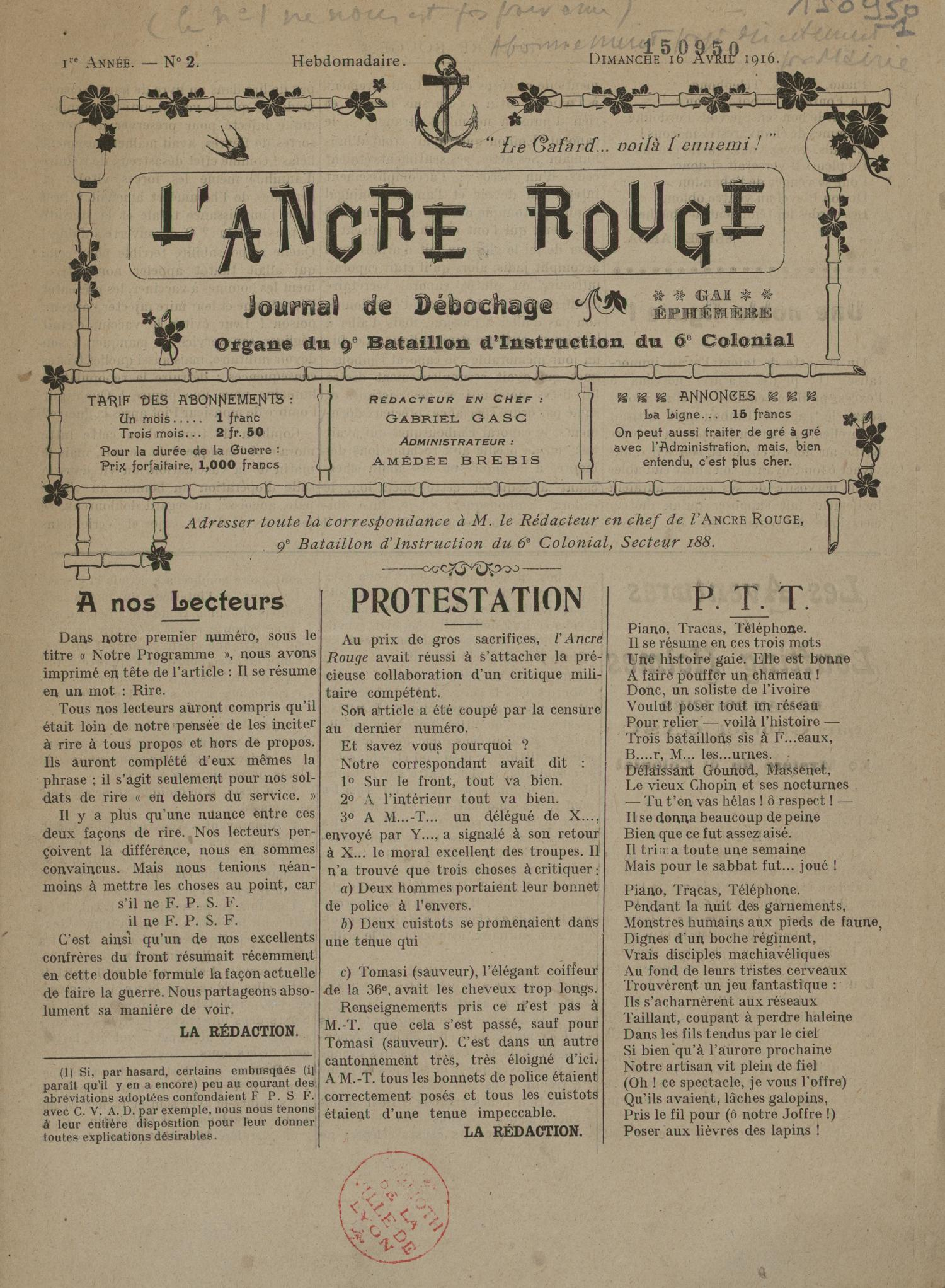 couverture